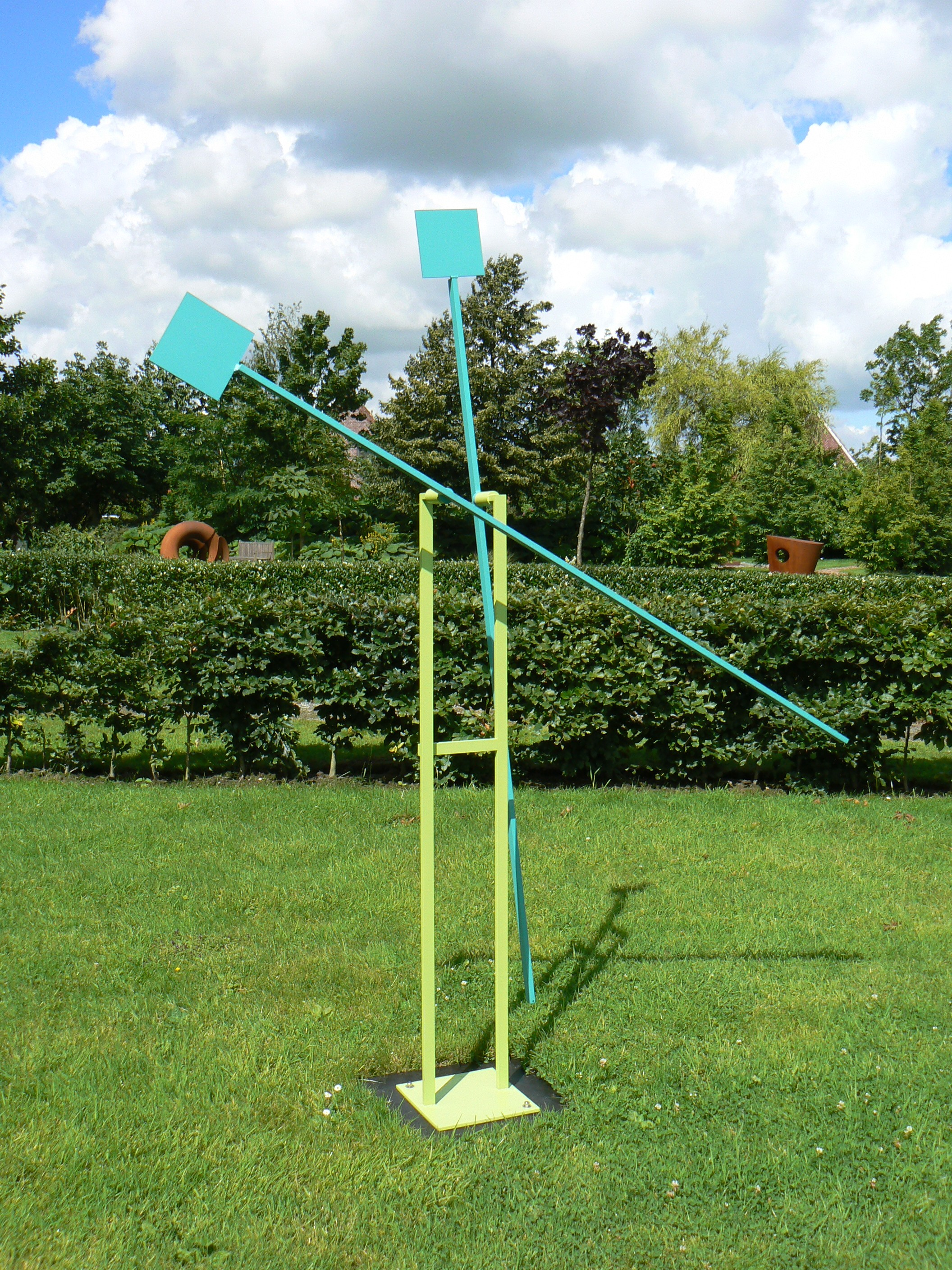 kinetic sculpture Funnix/Germany